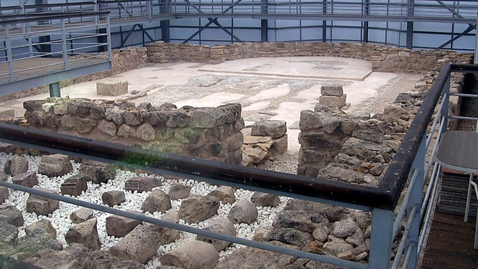 Hadrianopolis in Paphlagonien, antike Stadt bei Eskipazar, Nordtürkei, Kirchengrundriss mit Mosaikresten